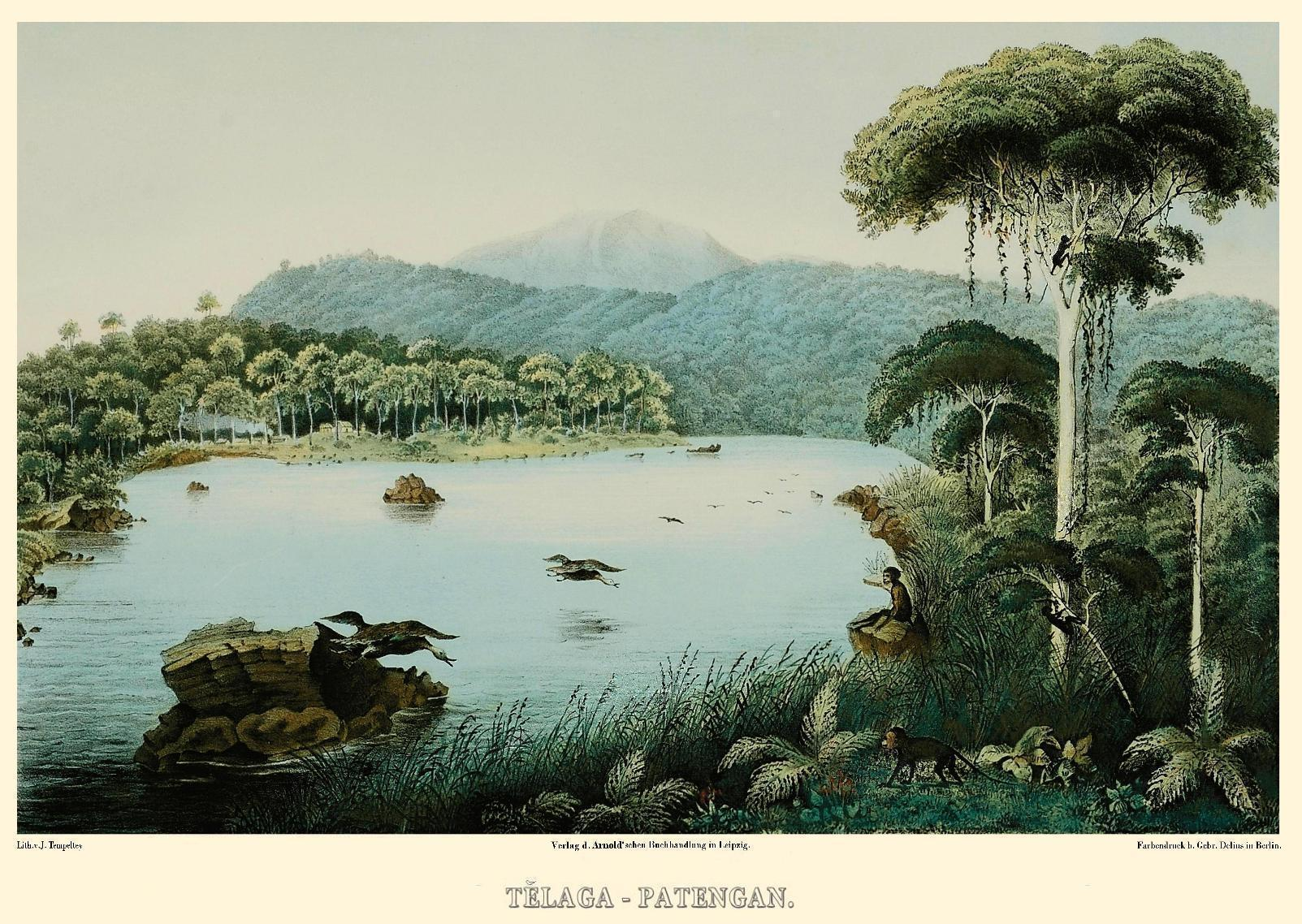 Telaga Patengan